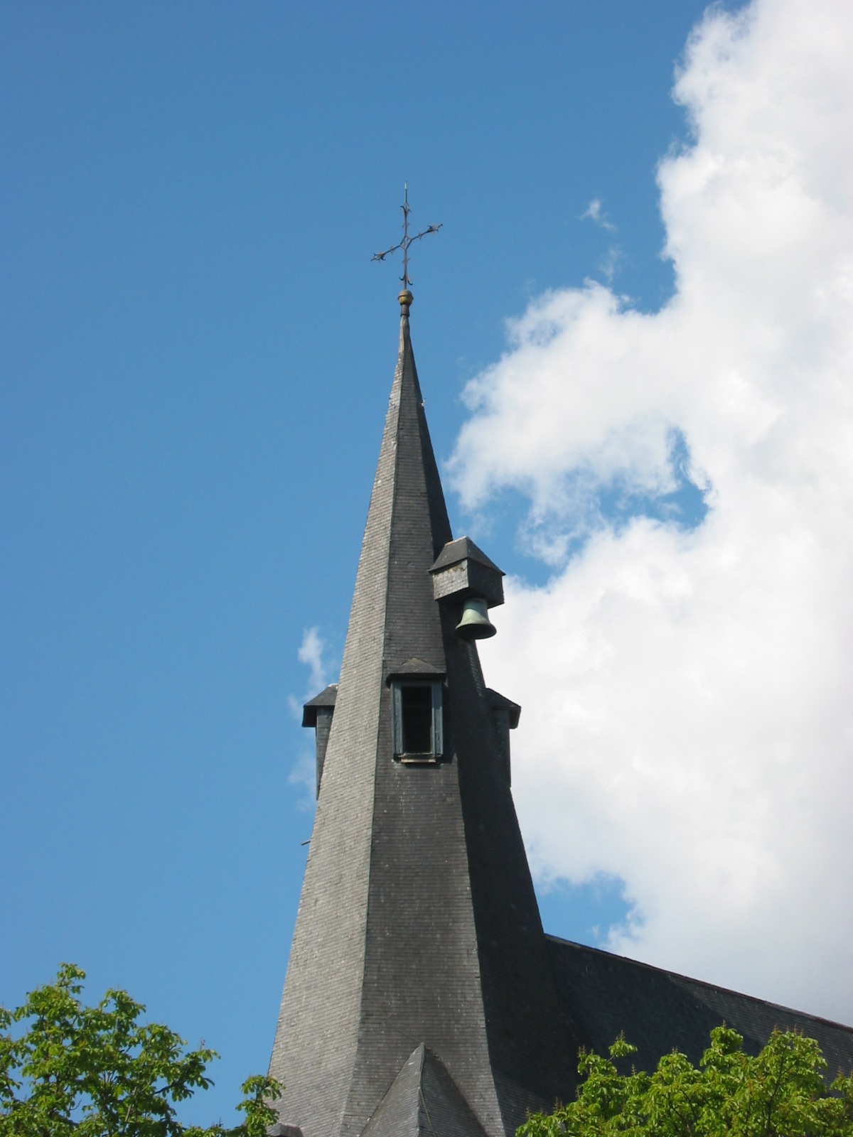 De klok van de Sint-Jacobskerk, die buiten de toren hangt, Leuven. (Gemaakt in juni 2006)